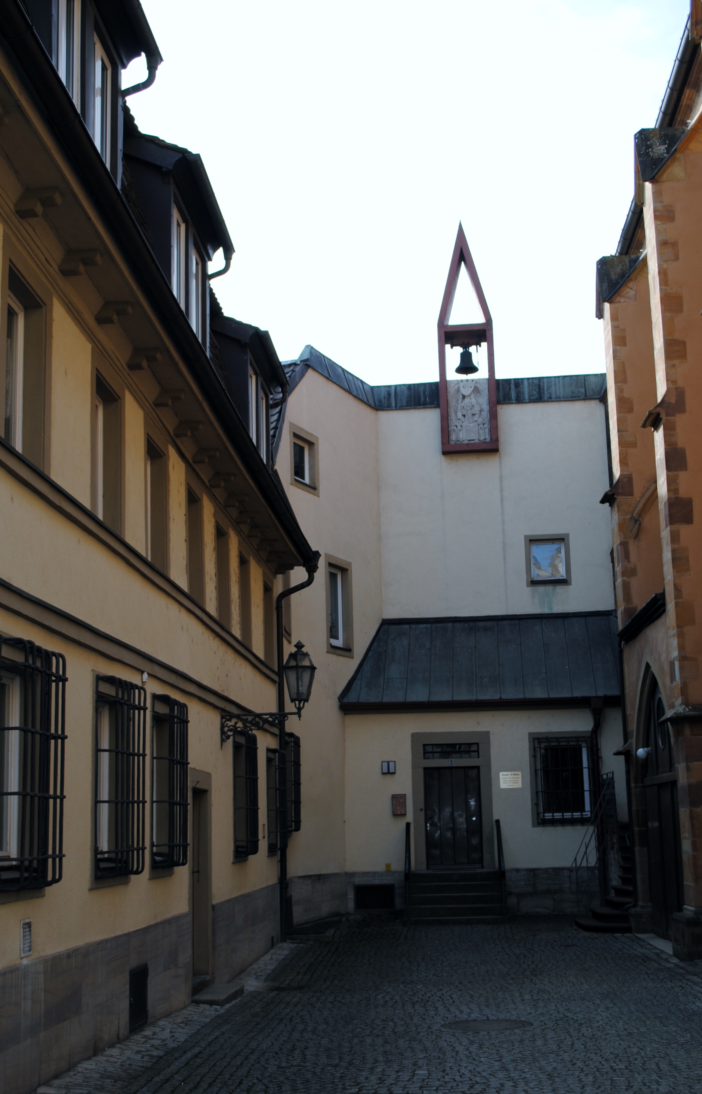 Kloster St. Maria in Volkach. Klostergasse 1 Volkach.